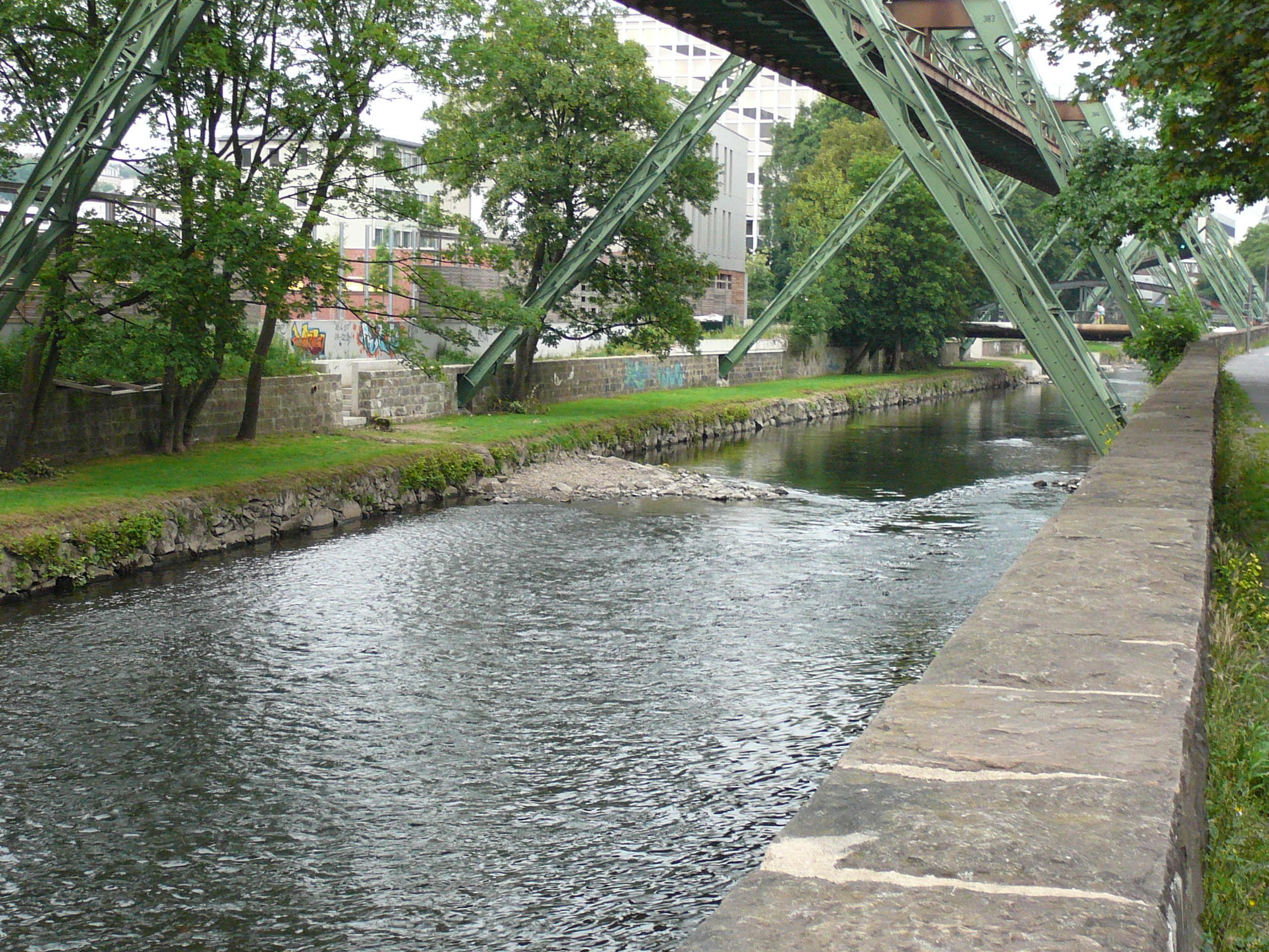 Friedrich-Engels-Allee, Wuppertal